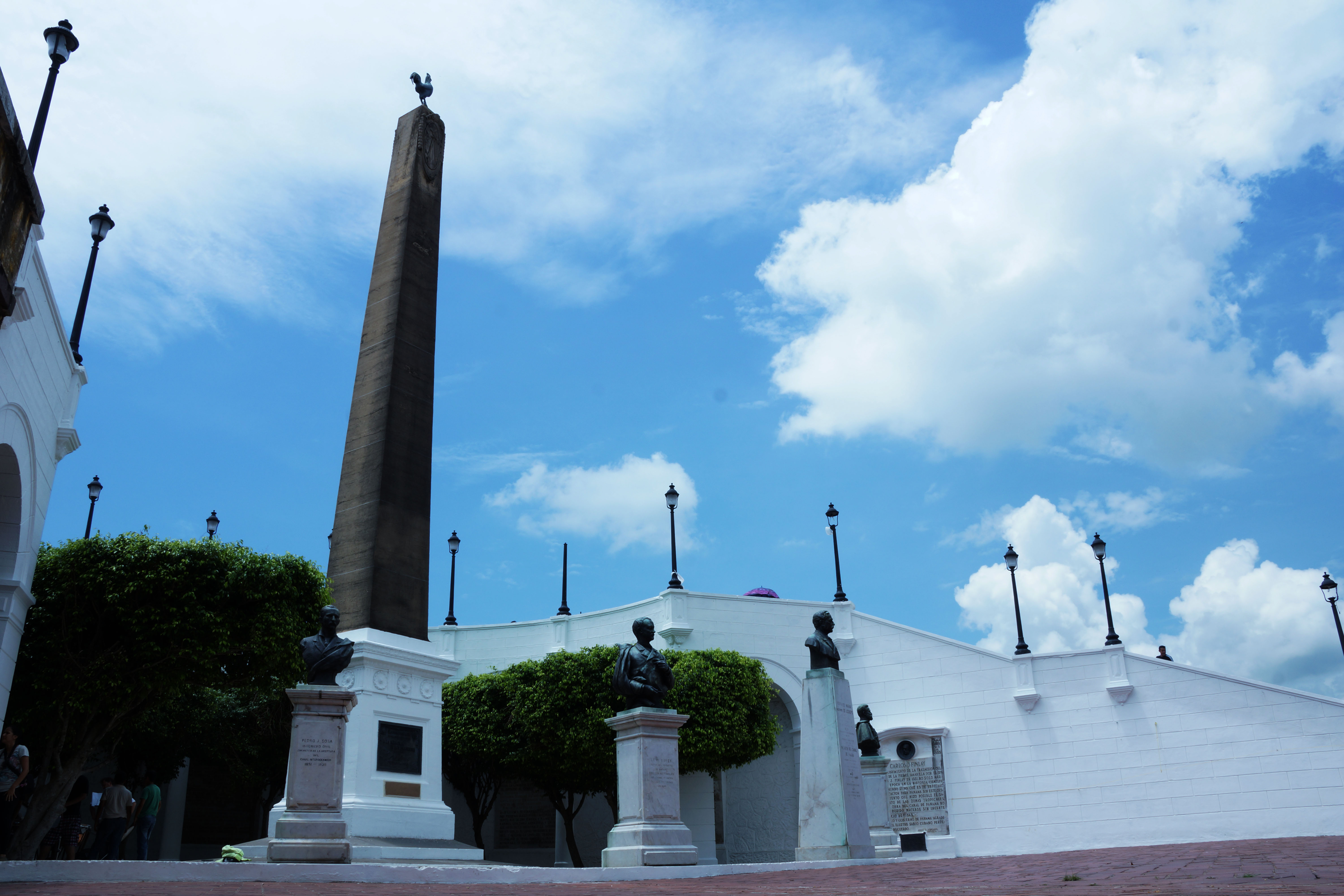 Debido al interés entre Panamá y Francia se tomó la iniciativa, para que en la parte interior de lo que era la fortaleza militar Chiriquí, se realizara un reconocimiento a los franceses, que en la década de 1880 dieran inicio a la gran empresa canalera, y en honor a este acontecimiento, surge lo que hoy conocemos como la Plaza de Francia. Cabe señalar que en dicha plaza, se fusiló a Victoriano Lorenzo, líder guerrillero coclesano, (nacido en la Provincia de Coclé, República de Panamá), que defendió desde muy joven los derechos de los desfavorecidos. Al fondo de la plaza hay doce paneles de mármol que relatan la aventura canalera francesa, fuente de inspiración del Doctor Octavio Méndez Pereira, también encontramos los bustos de los franceses Armando Reclus y Lucien Napoleón Bonaparte Wyse, y, por supuesto el busto de Ferdinand De Lesseps. Un hermoso obelisco, rematado con un gallo, símbolo de Francia, le da un toque personal a la plaza.